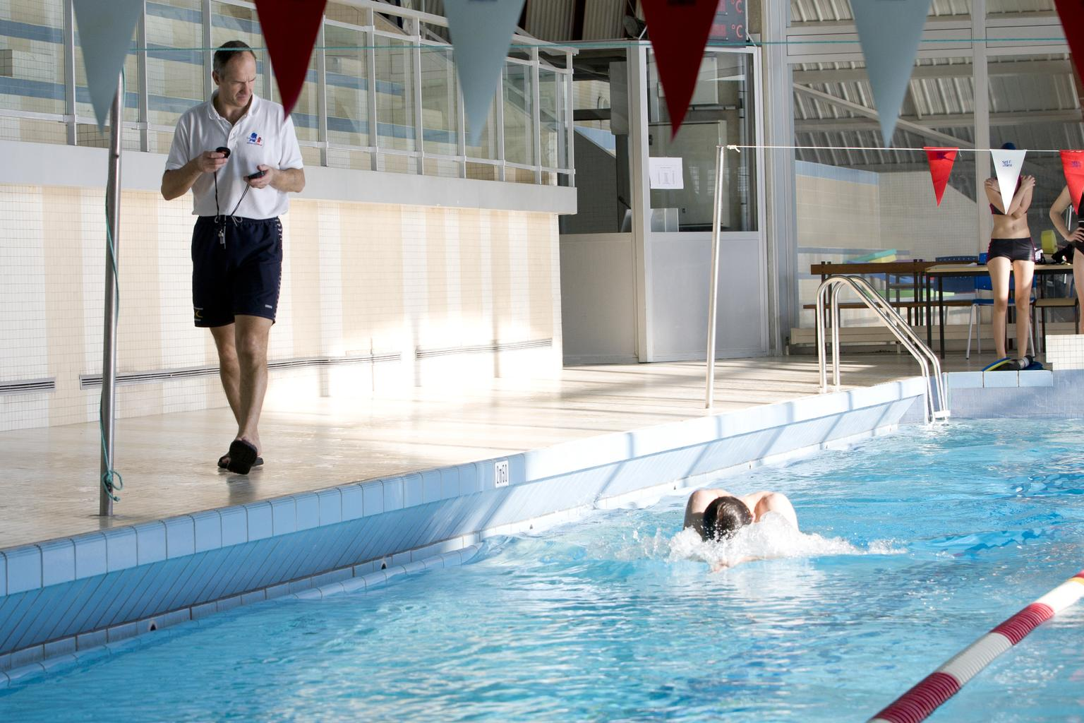 Photo de la piscine de l'École polytechnique